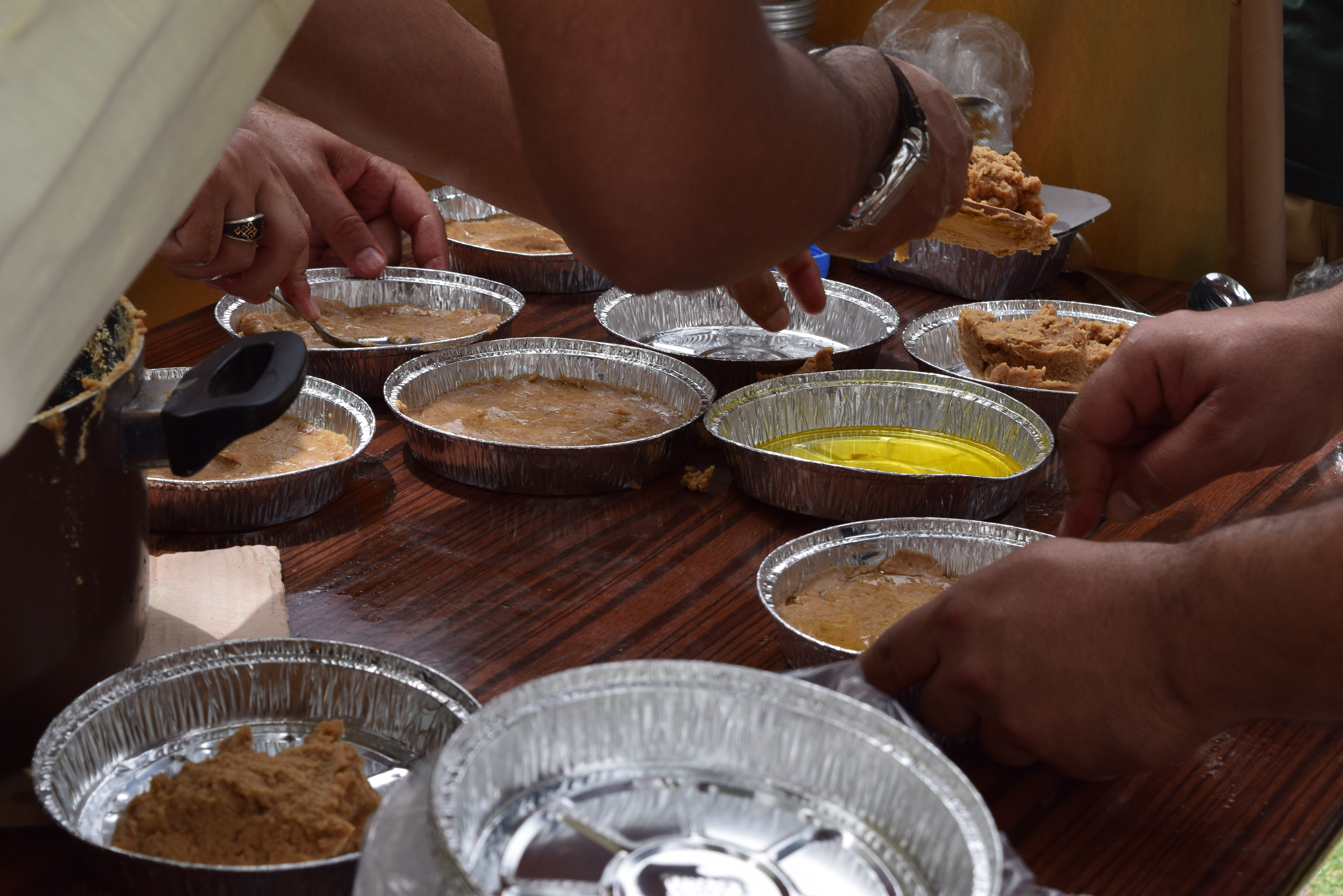 صورة في يوم العصيدة القطيفي لمجموعة شبّان متطوعون يعملون على تحضير أطباق العصيدة وتوزيعها على المارّة.